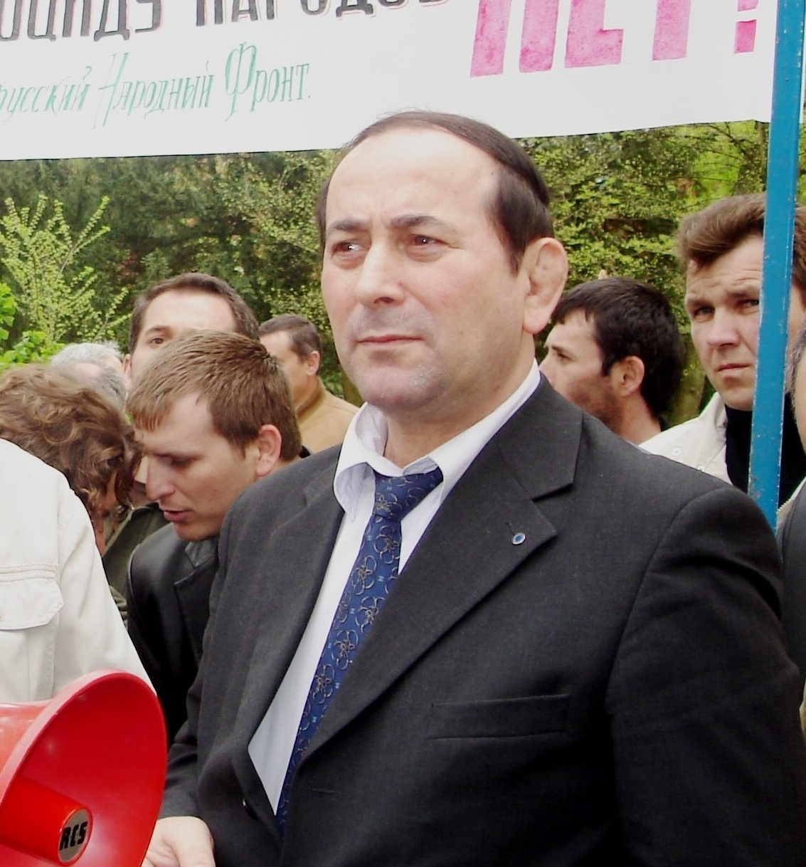 Ахъяд Идигов на митинге.